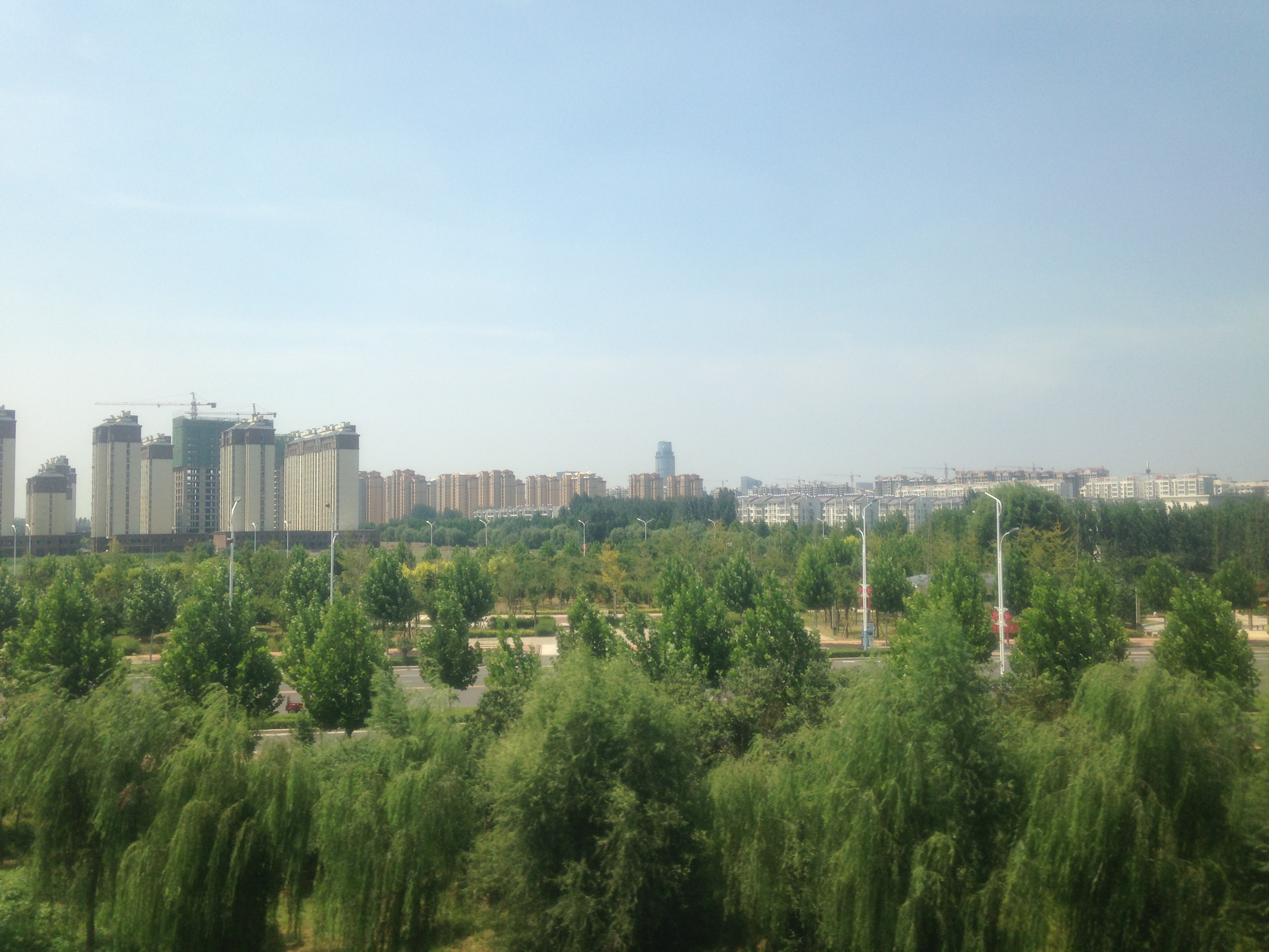 石武旅客専用線の列車内より望む鶴壁東駅付近の景色